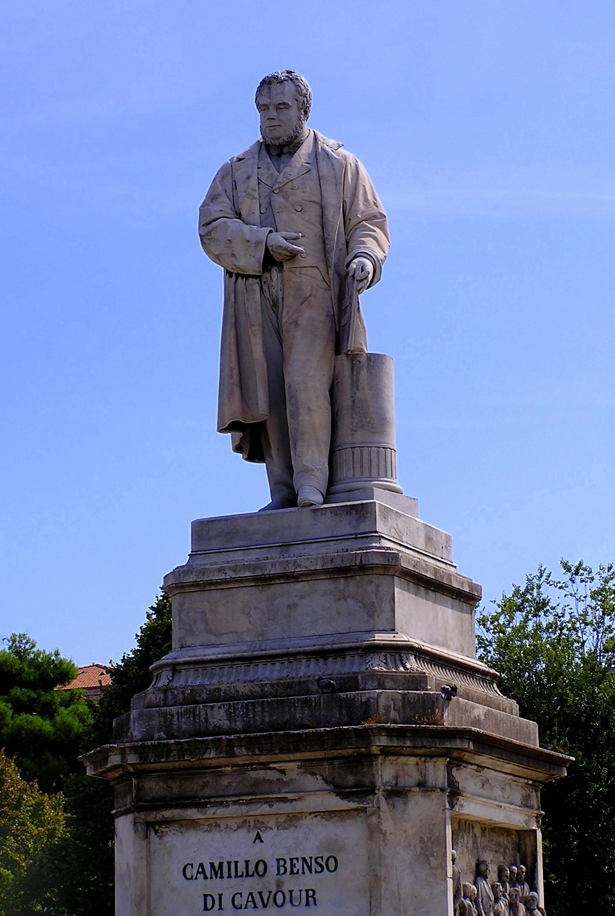 la foto rappresenta la statua di Cavour, opera di Aristodemo Costoli, che fu posta nel 1868 al centro di Piazza Cavour di Ancona.